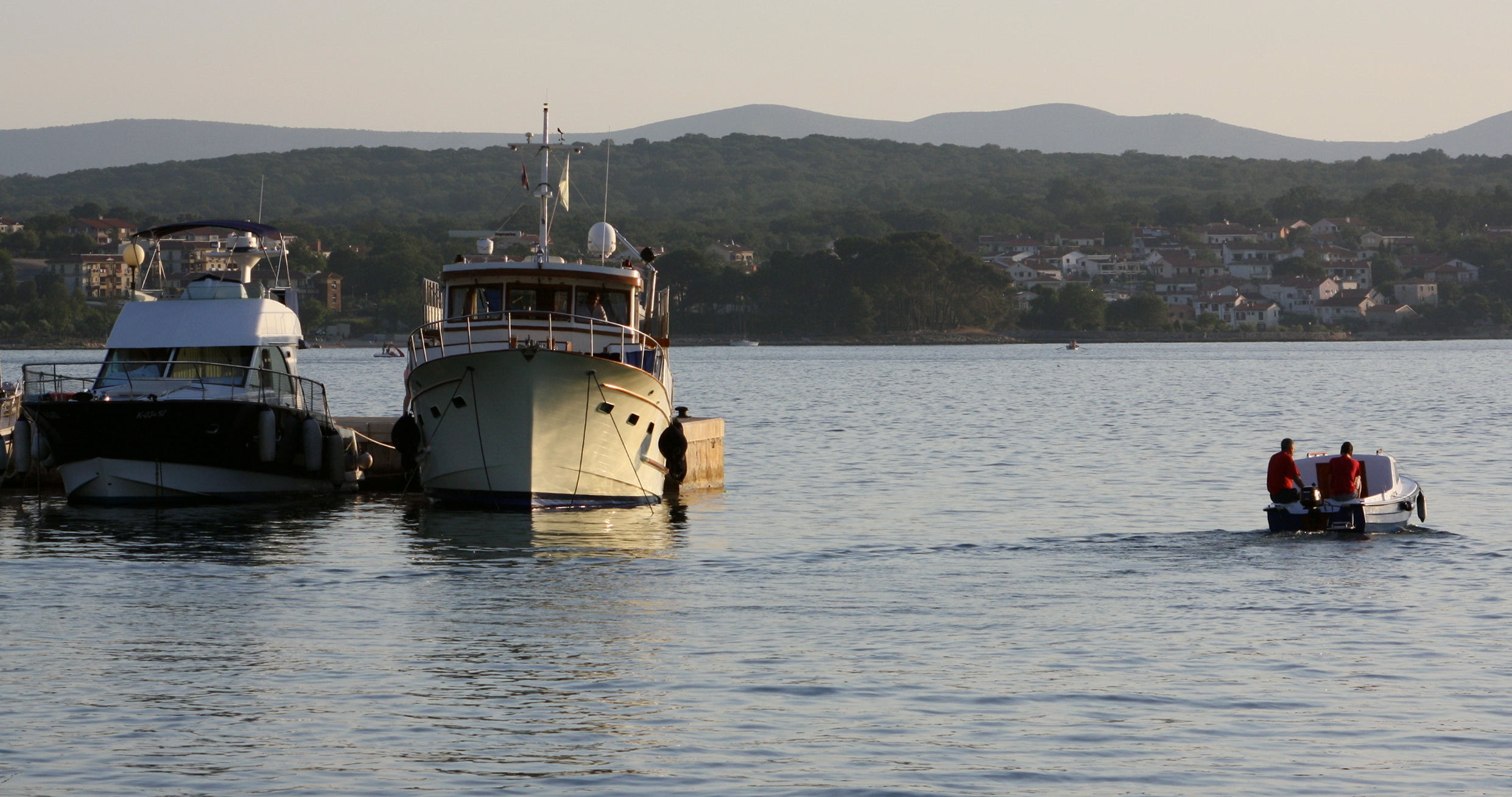 Ortschaft Porat auf der Insel Krk vom Hafen der Ortschaft Malinska gesehen